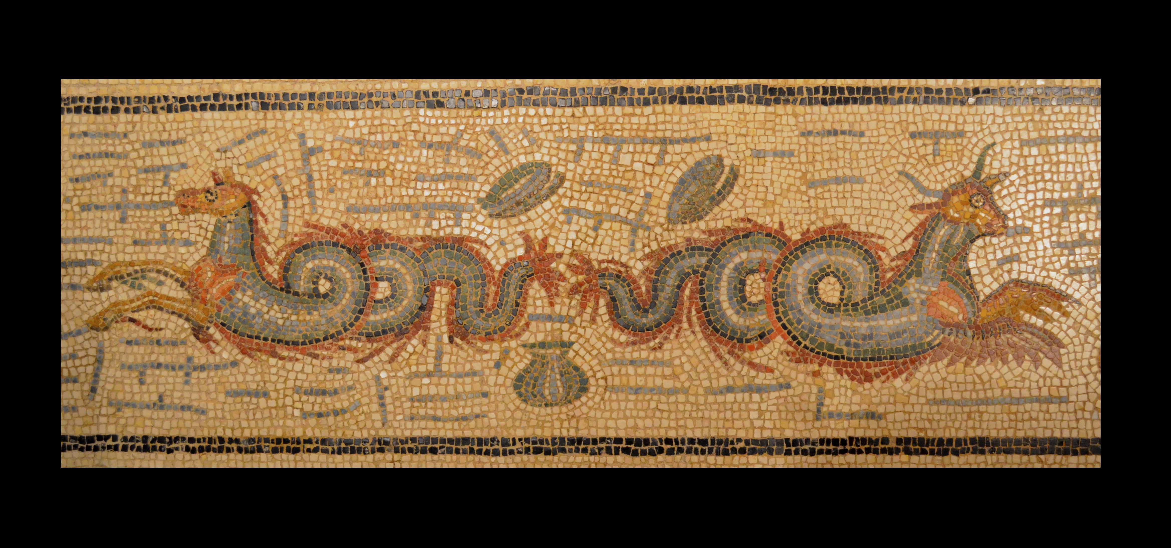 Musée gallo-romain de Fourvière (Lyon) - Mosaïque aux Poissons, detail central de la bordure.